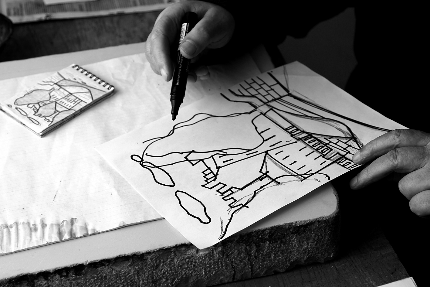 2013 17.04. Гага Ковенчук рисует город (эскиз последней литографии художника).